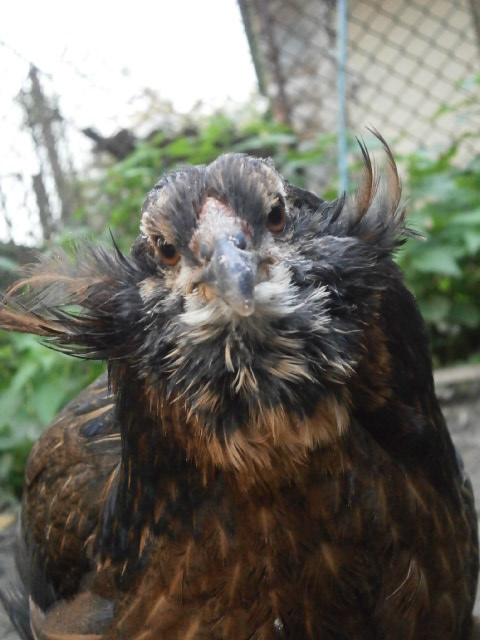 Divoké zbarvení slepice araukany. Zde je varieta s vousem a licousy.